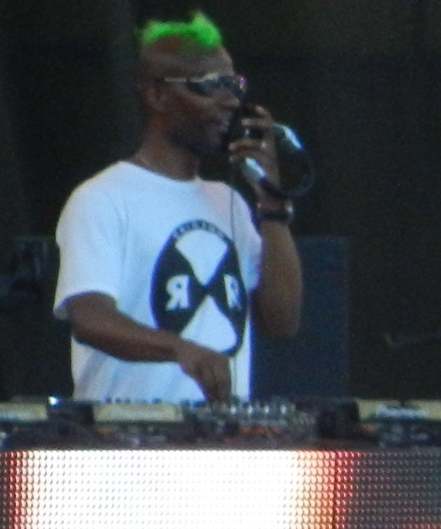 Green Velvet